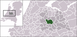 Kaart aangepast, n.a.v. herindeling Utrechtse Heuvelrug. gebruiker:Ajoman Locatie gemeente Utrecht. Afbeelding gemaakt door gebruiker:Mtcv en vrij te gebruiken.